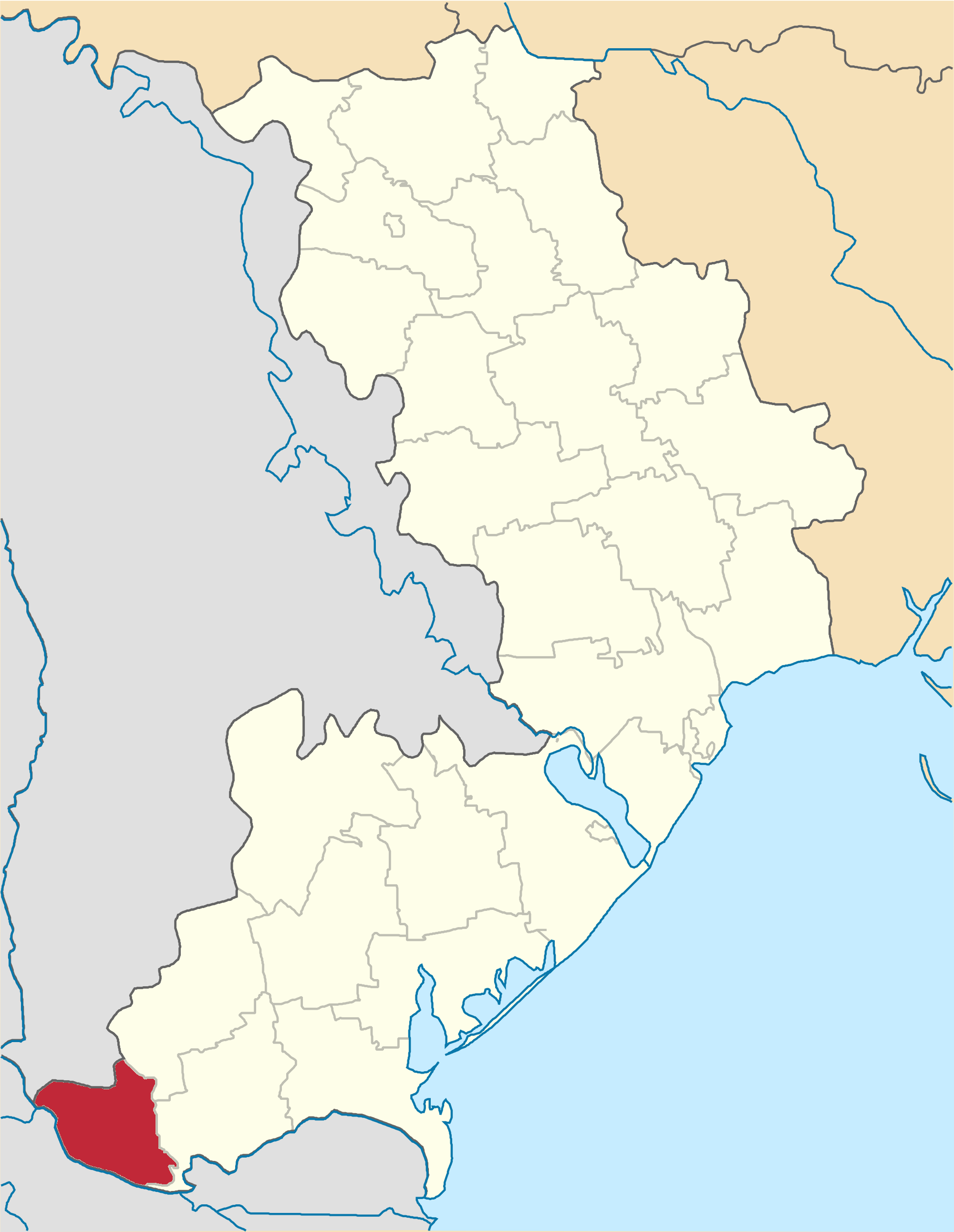 Reniyskyi-Raion map